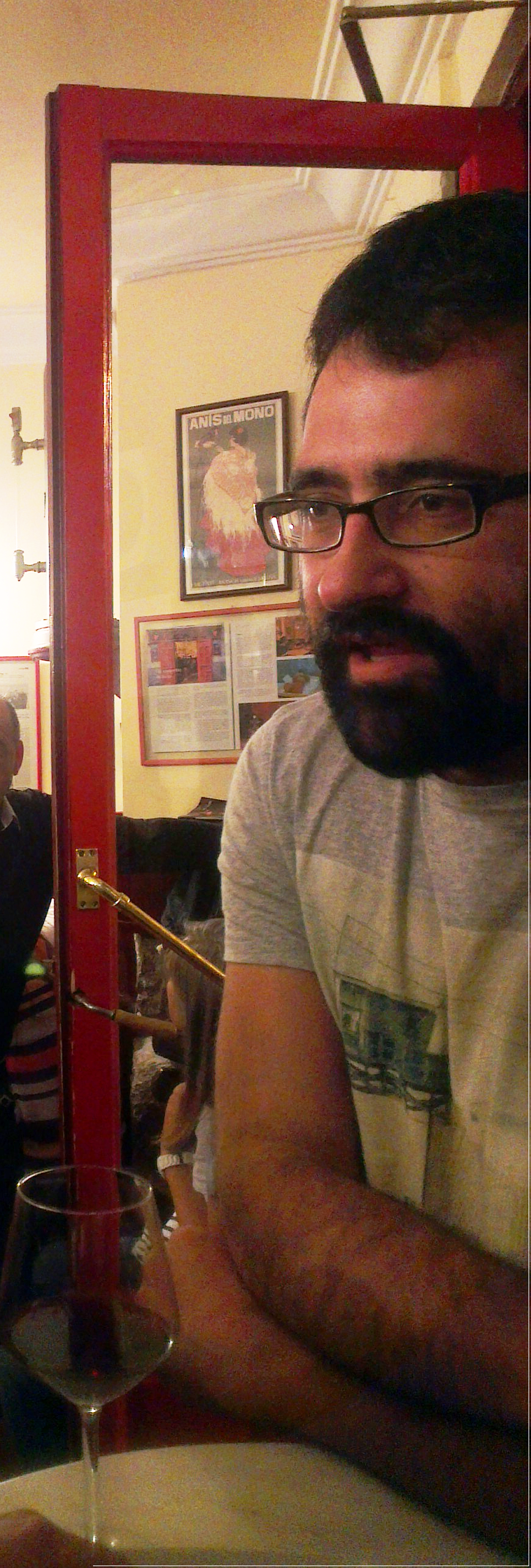 Fotografía del fotográfo Paco Gómez García en un bar de Malasaña (Madrid)